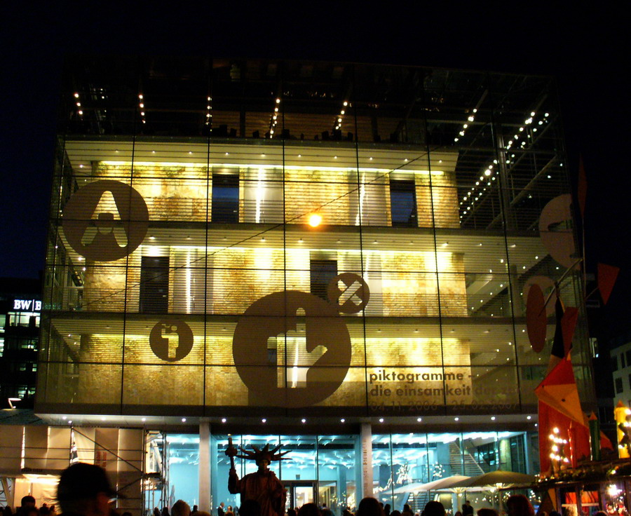 Stuttgart Kunstmuseum nachts